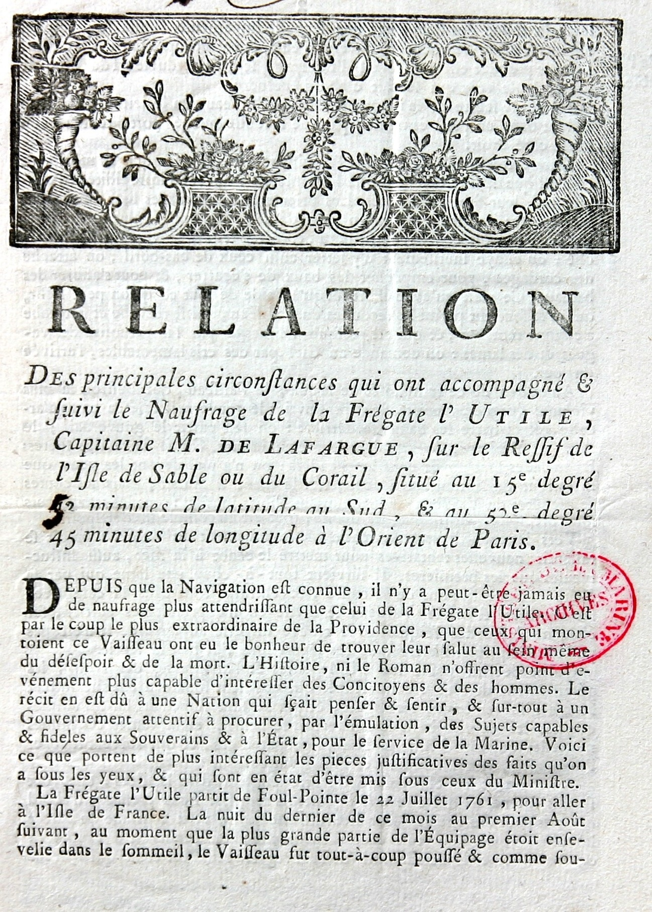 Rapport imprimé sur le naufrage de L'Utile, première page